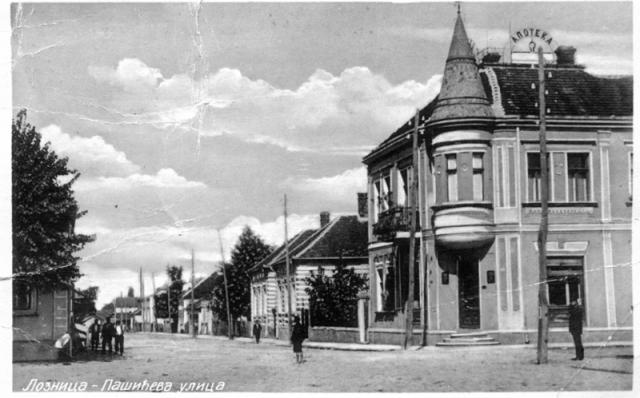 Stara apoteka u Loznici, danas Muzej Jadra.